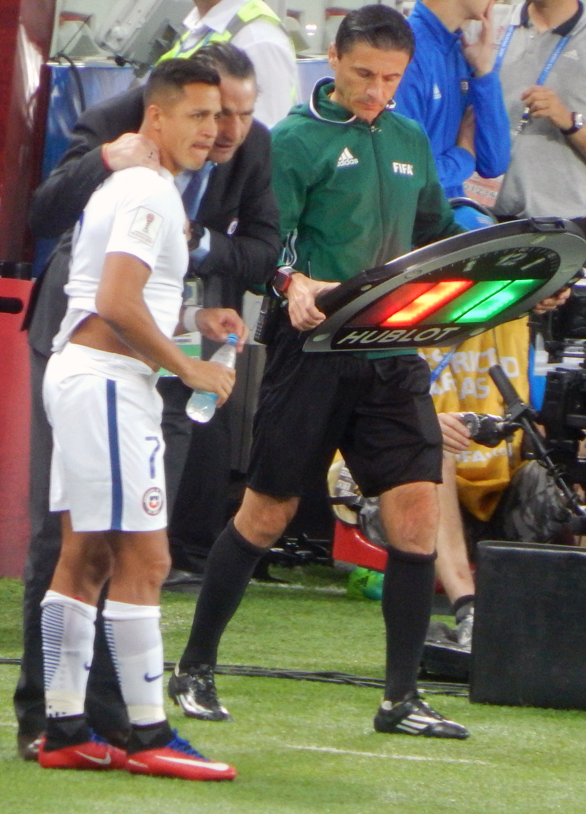 Алексис Санчес готовится выйти на замену и разговаривает с Хуаном Антонио Пицци - главным тренером сборной Чили